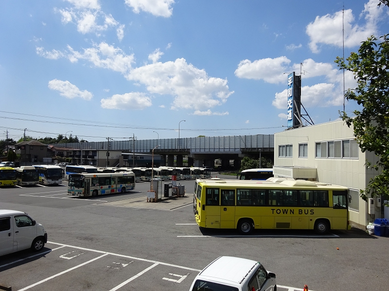 平和交通本社